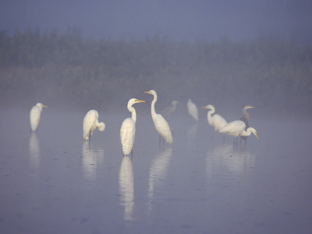 Egretta alba